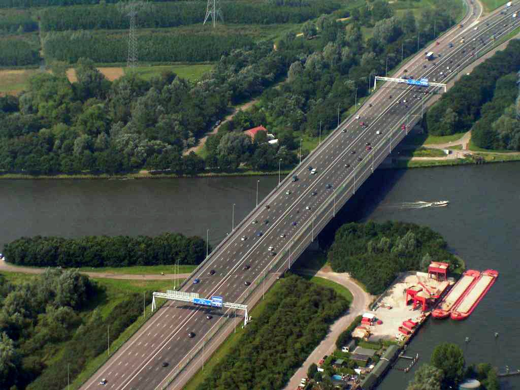 Rijksweg 1 (NL) am Amsterdam-Rheinkanal Aus der NL-Wikipedia